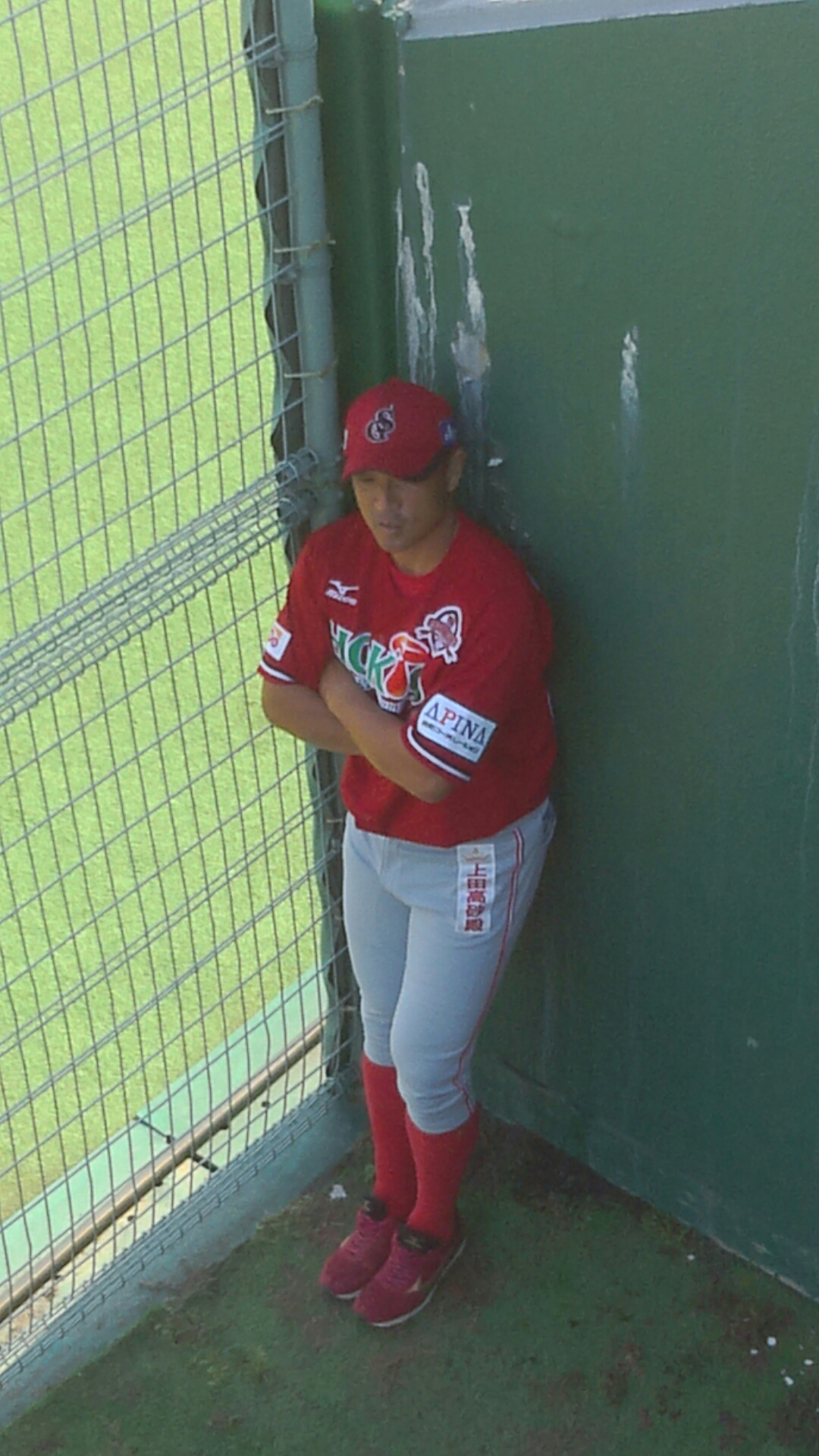 信濃グランセローズ時代の大塚晶文